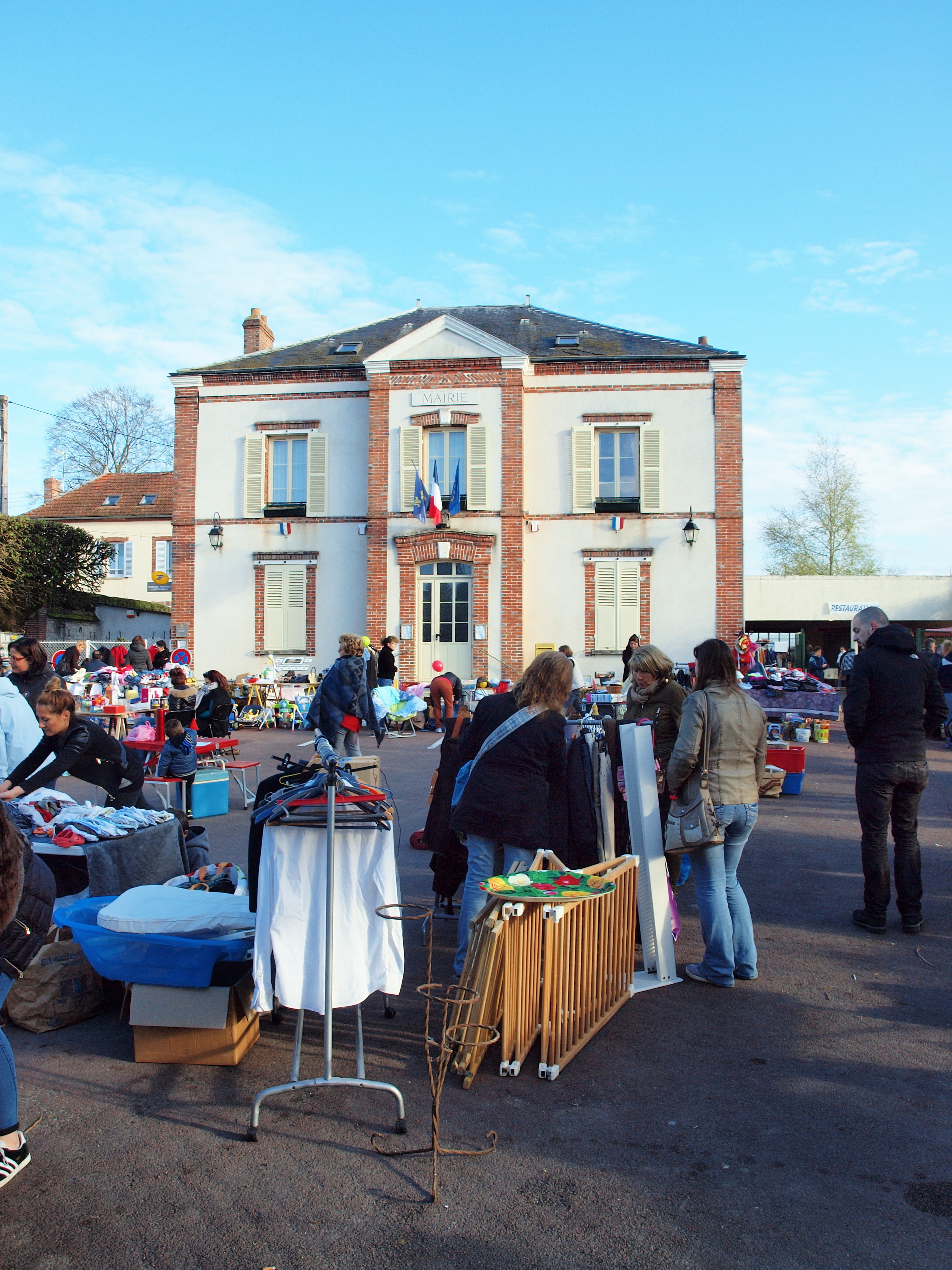 Everly (Seine-et-Marne, France)